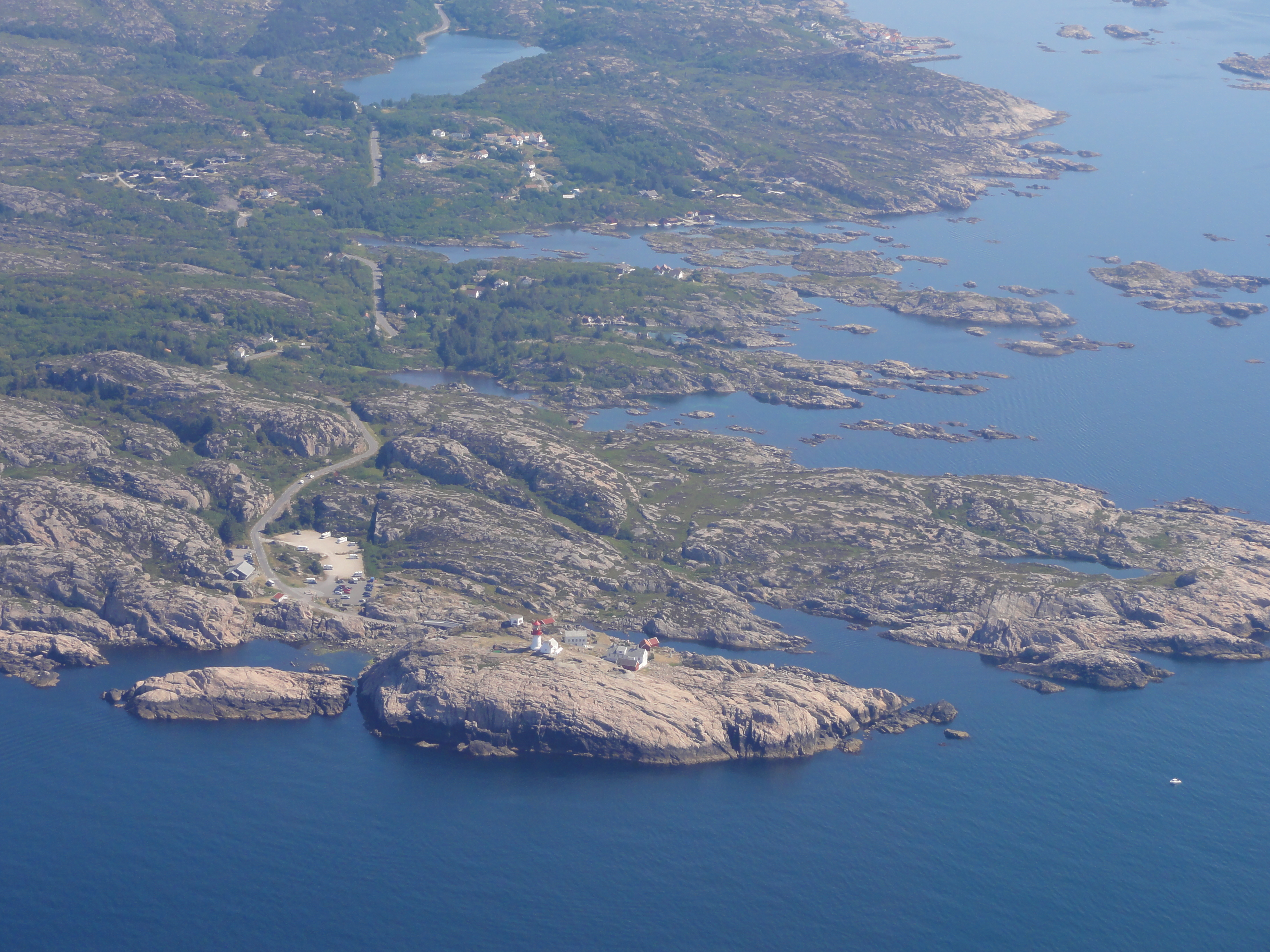 Lindesnes og fastlandet innenfor sett fra fly